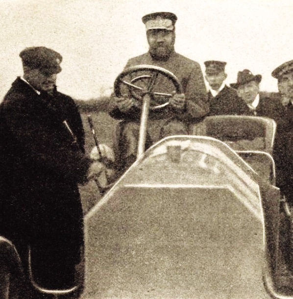 Willy Pöge, vainqueur sur Mercedes de la Course de Westend à l'hippodrome de Berlin, en octobre 1903 - La Vie au Grand Air du 6 novembre 1903, p.823